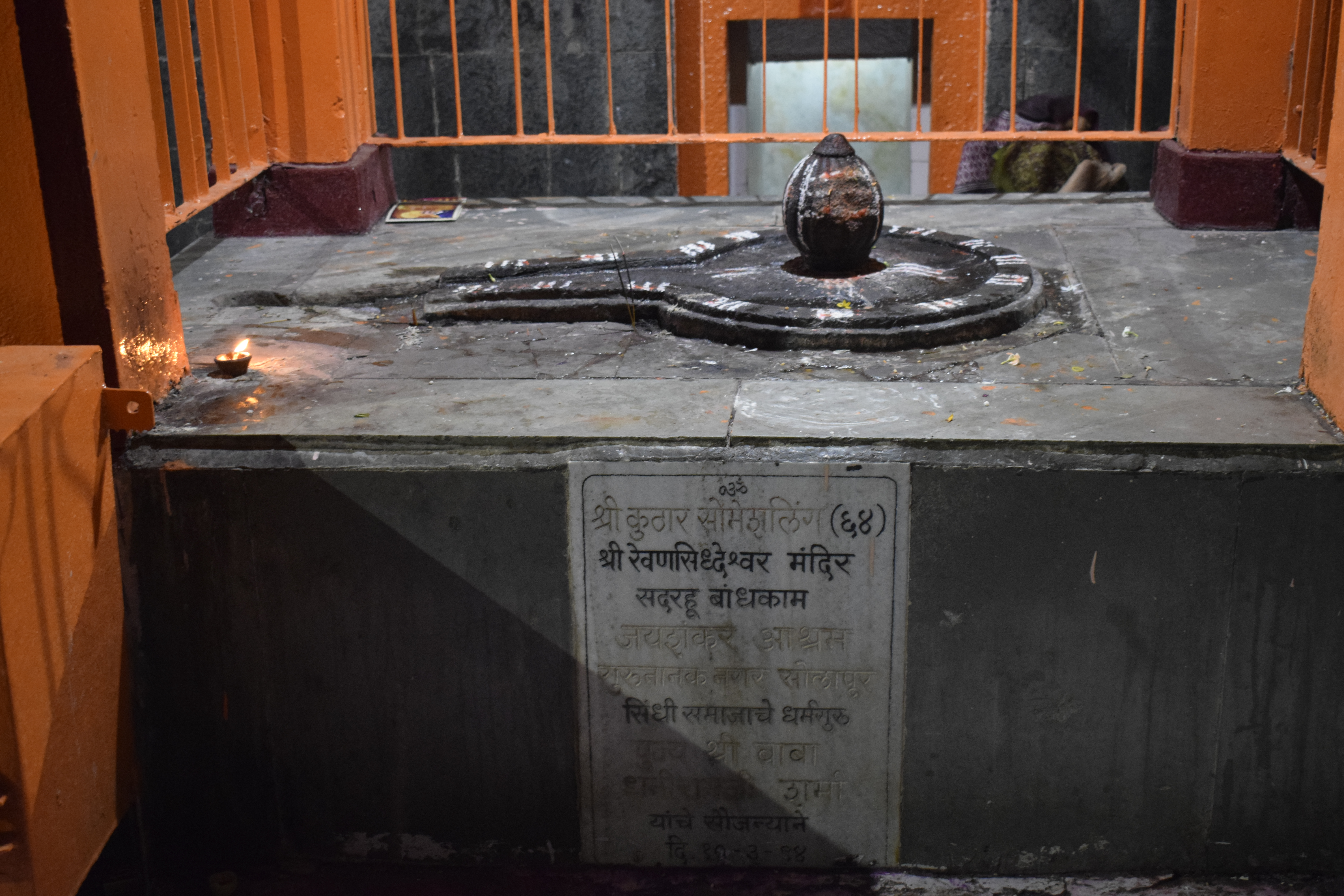 श्री. कुठार सोमेशलिंग (६४ ) – श्री रेवणसिध्देश्वर मंदिर